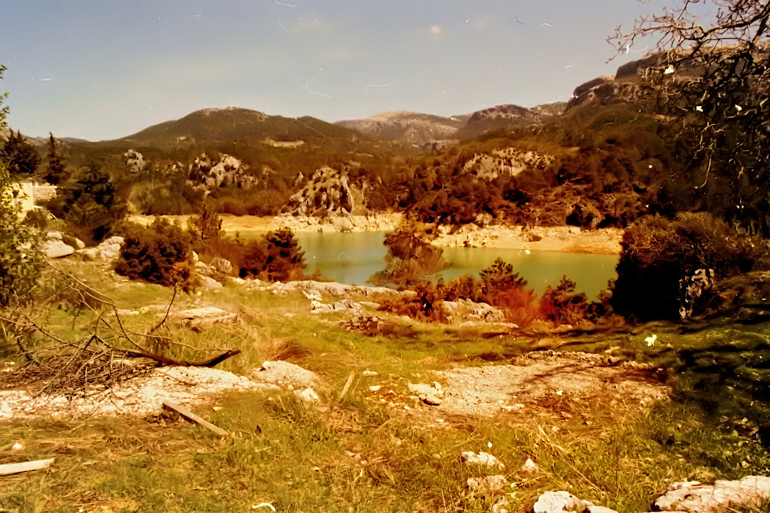 Vista del embalse del Guadalmena y de su entorno natural.